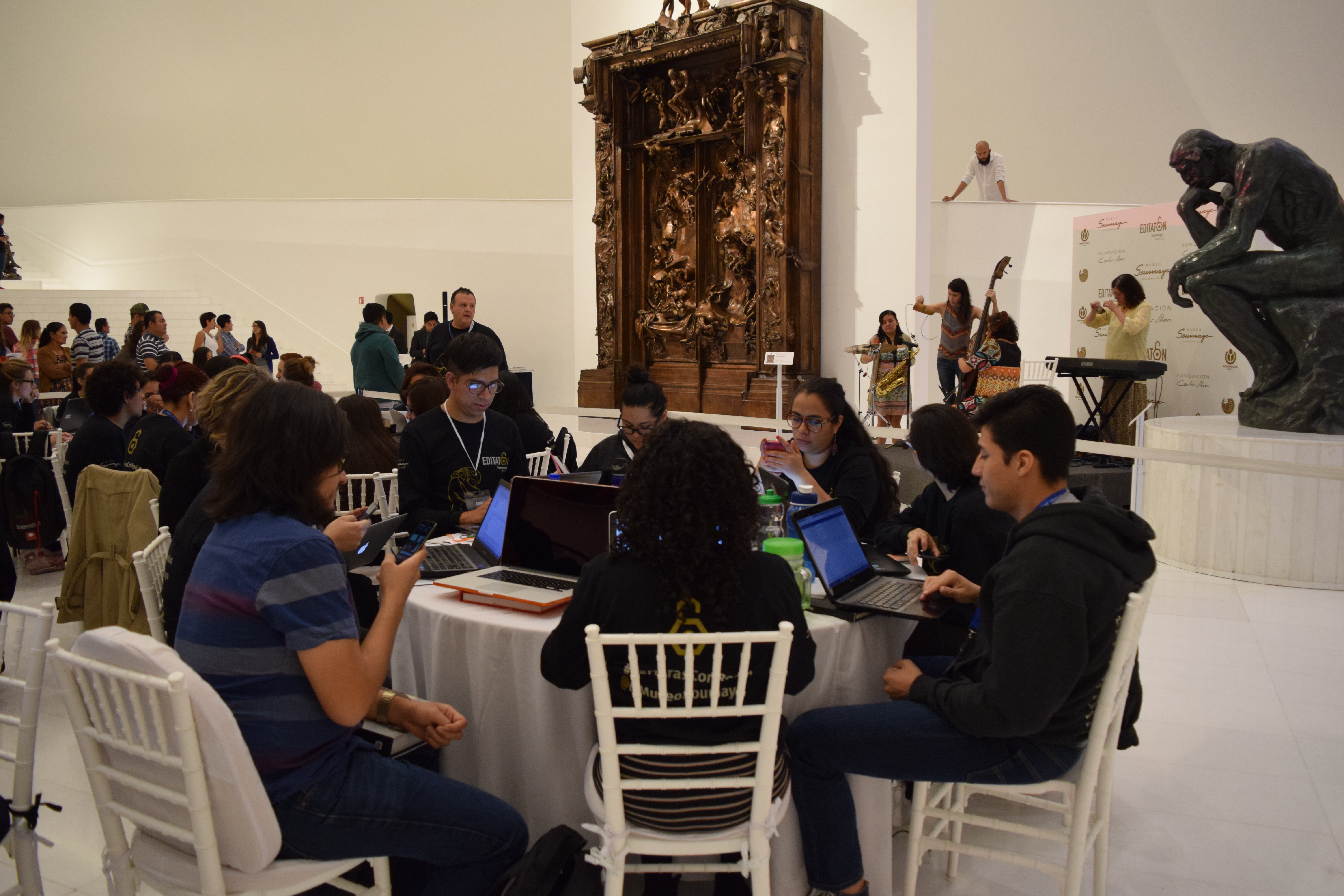 Editatón 72 horas con Rodin en el Soumaya